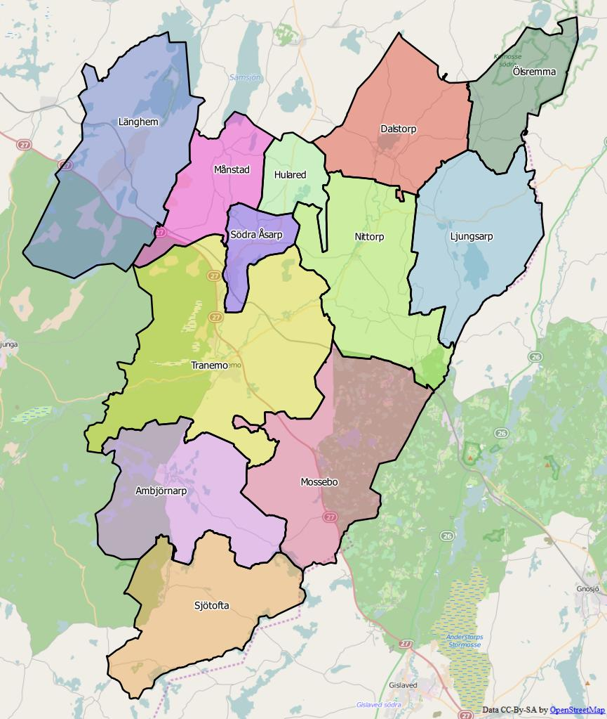 Distriktsindelningen i Tranemo kommun World file: 82.81263274759170656 0 0 -82.81263274759170656 1459665.32612744998186827 7902756.12667999230325222